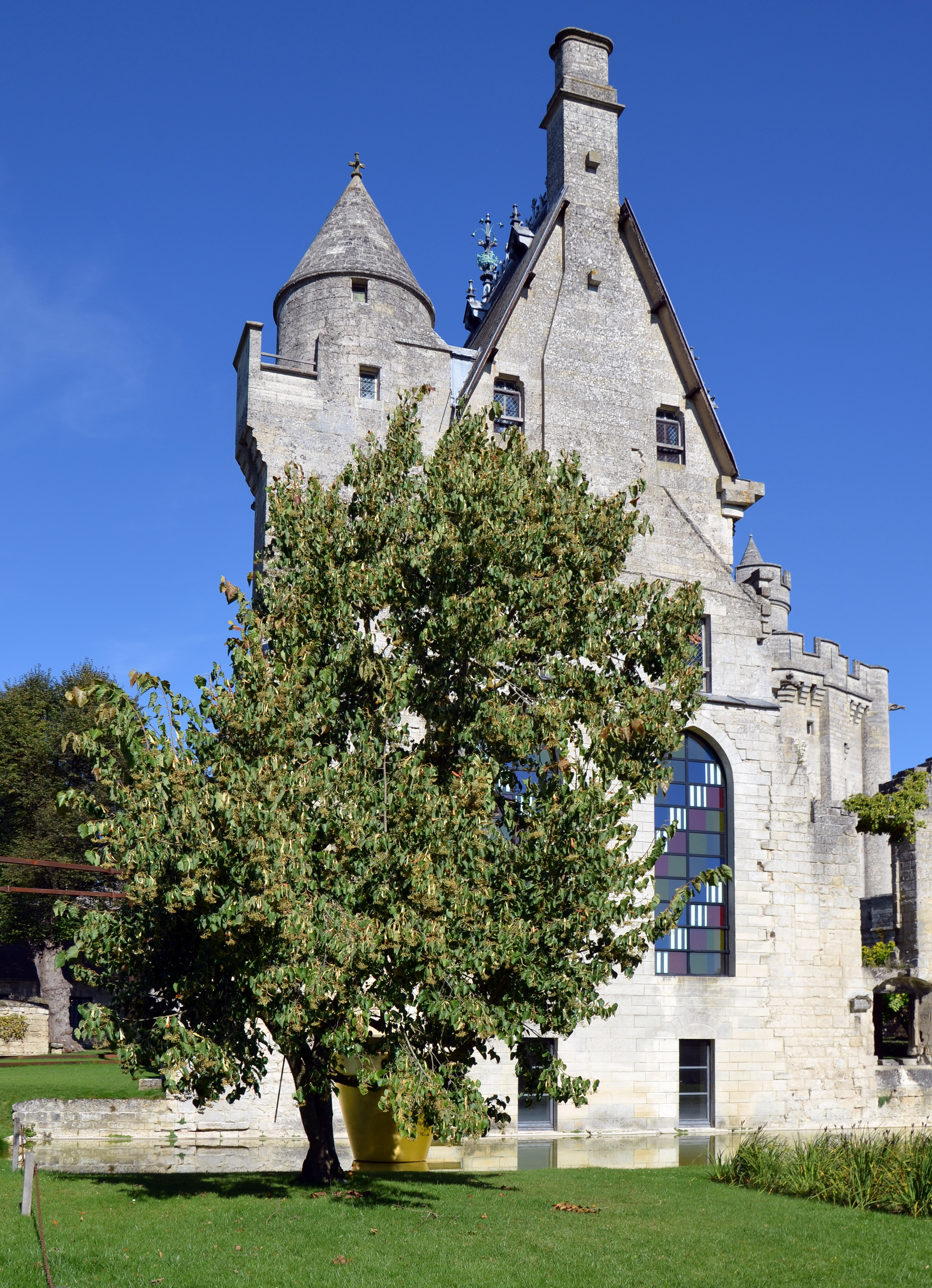 Ancienne chapelle du chateau de Vez, Oise, Picardie, France